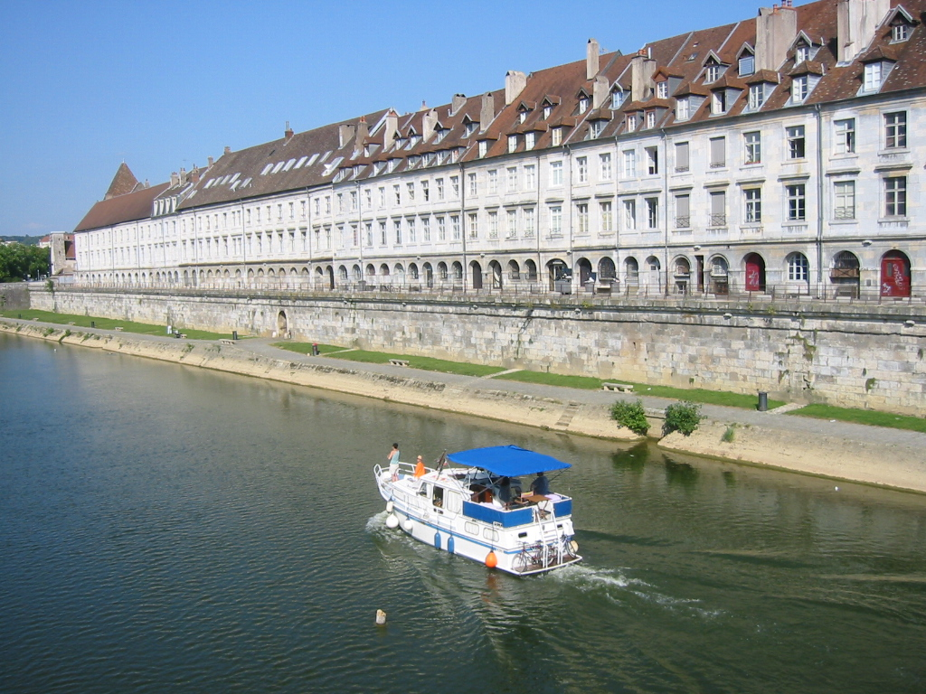 Quai Vauban, construit par ce dernier au XVIIe siècle, ils n'ont depuis pas été modifié, du moins de l'extérieur. Besançon